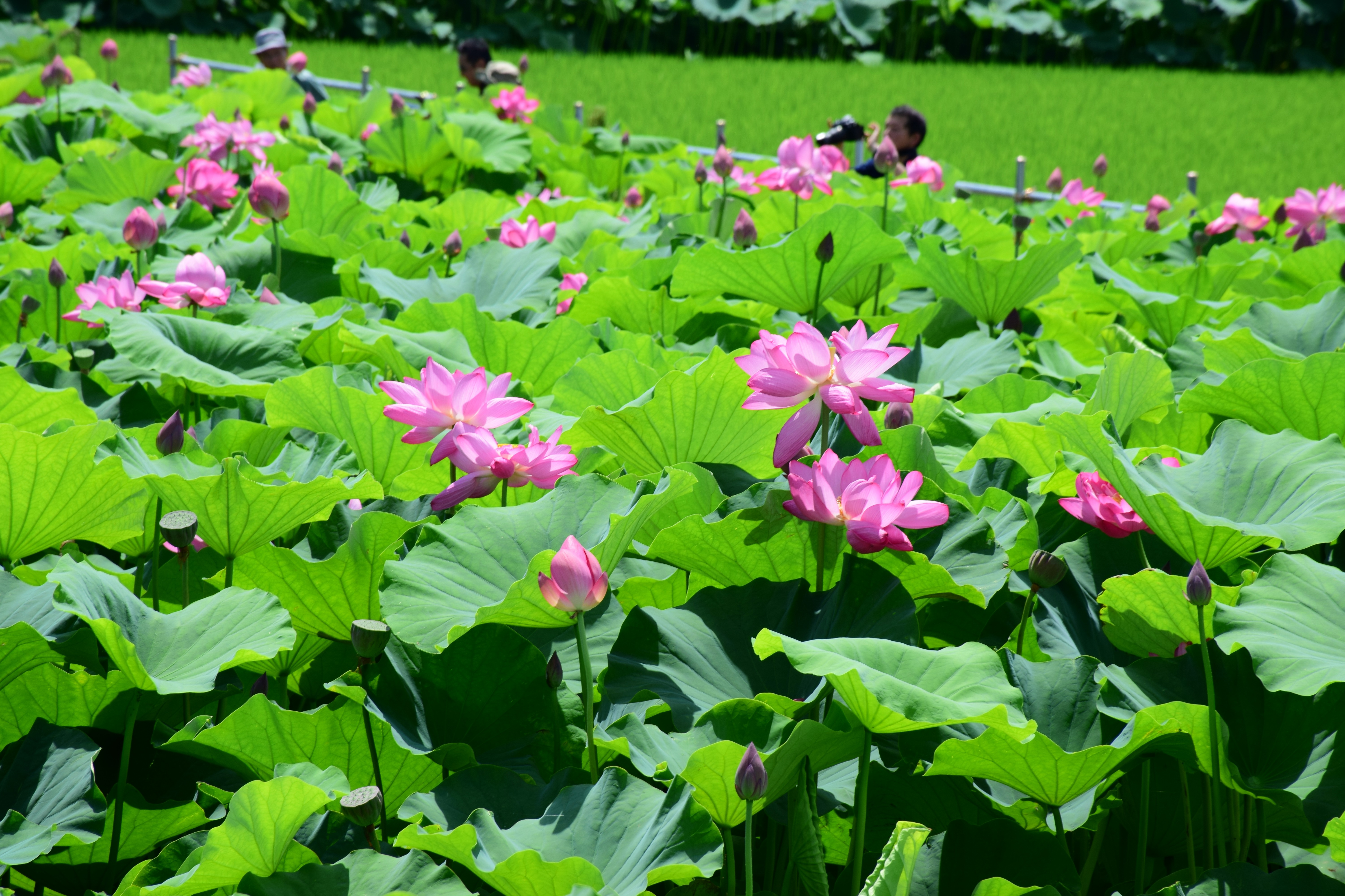 森川花はす田